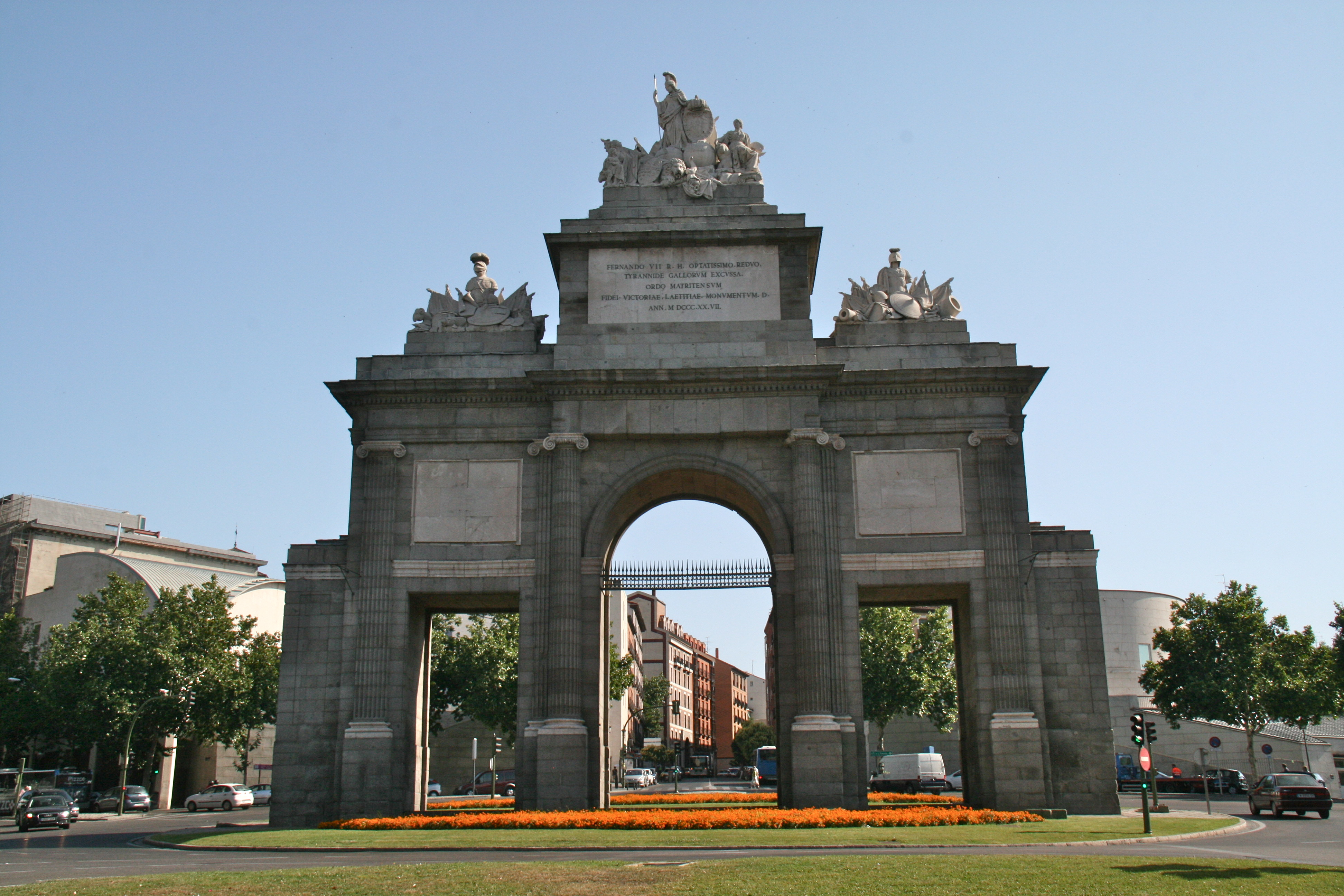 Puerta de Toledo